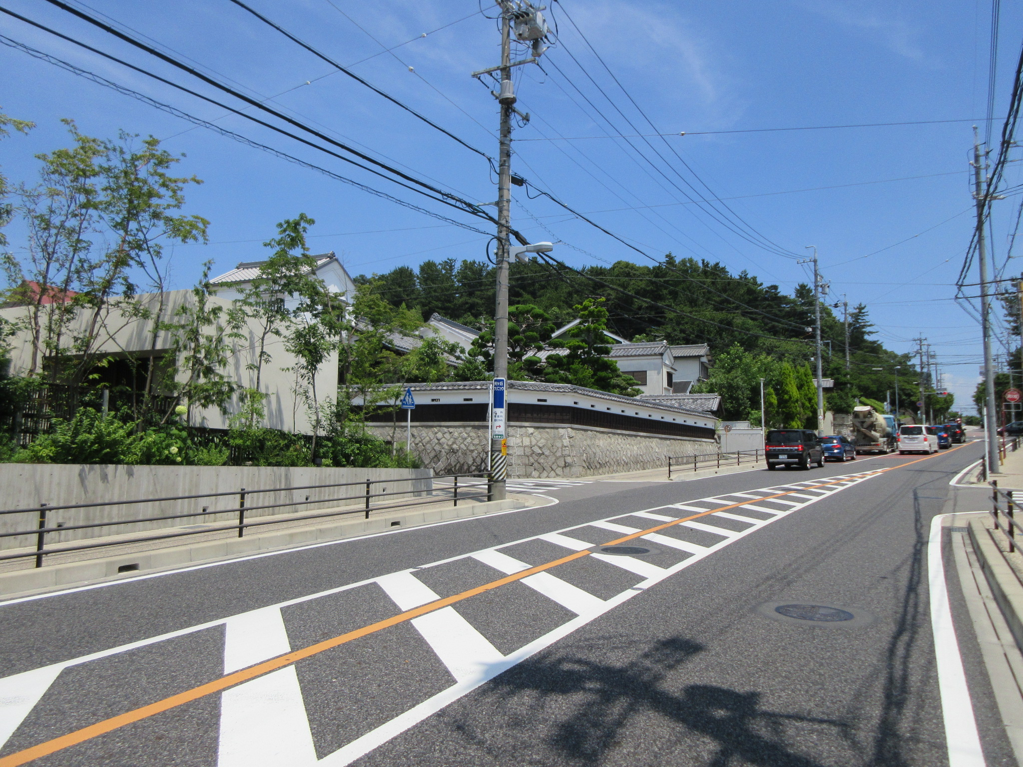 会議所通り（岡崎市竜美中）